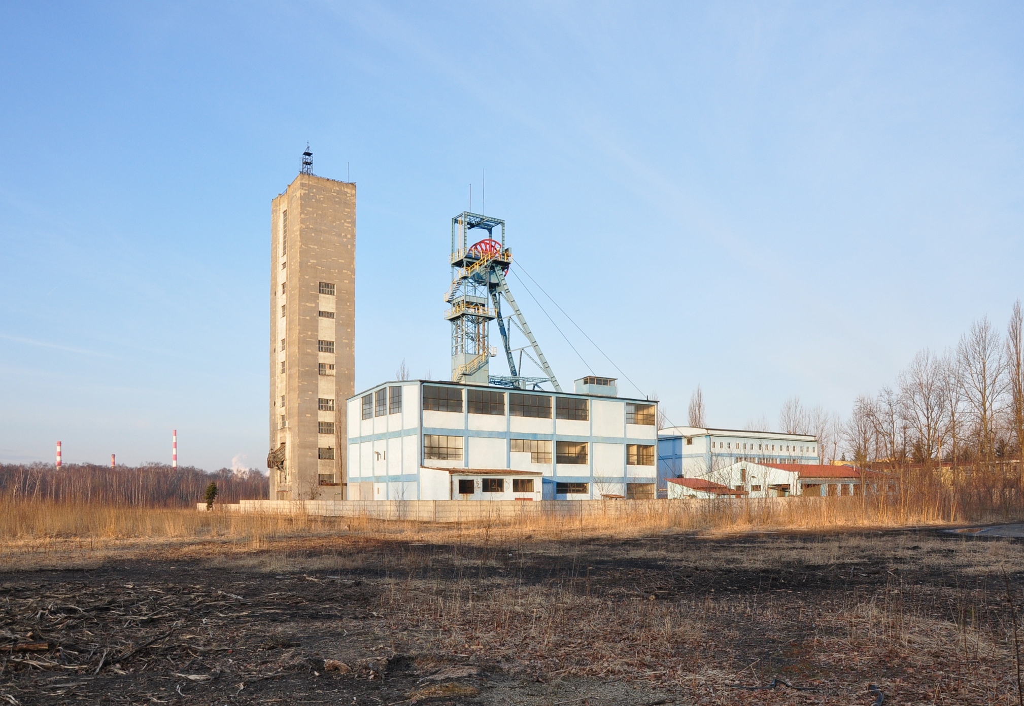 Nieczynna Kopalnia Węgla Kamiennego "Jan Kanty" Jaworzno (w czasach PRL KWK "Komuna Paryska").